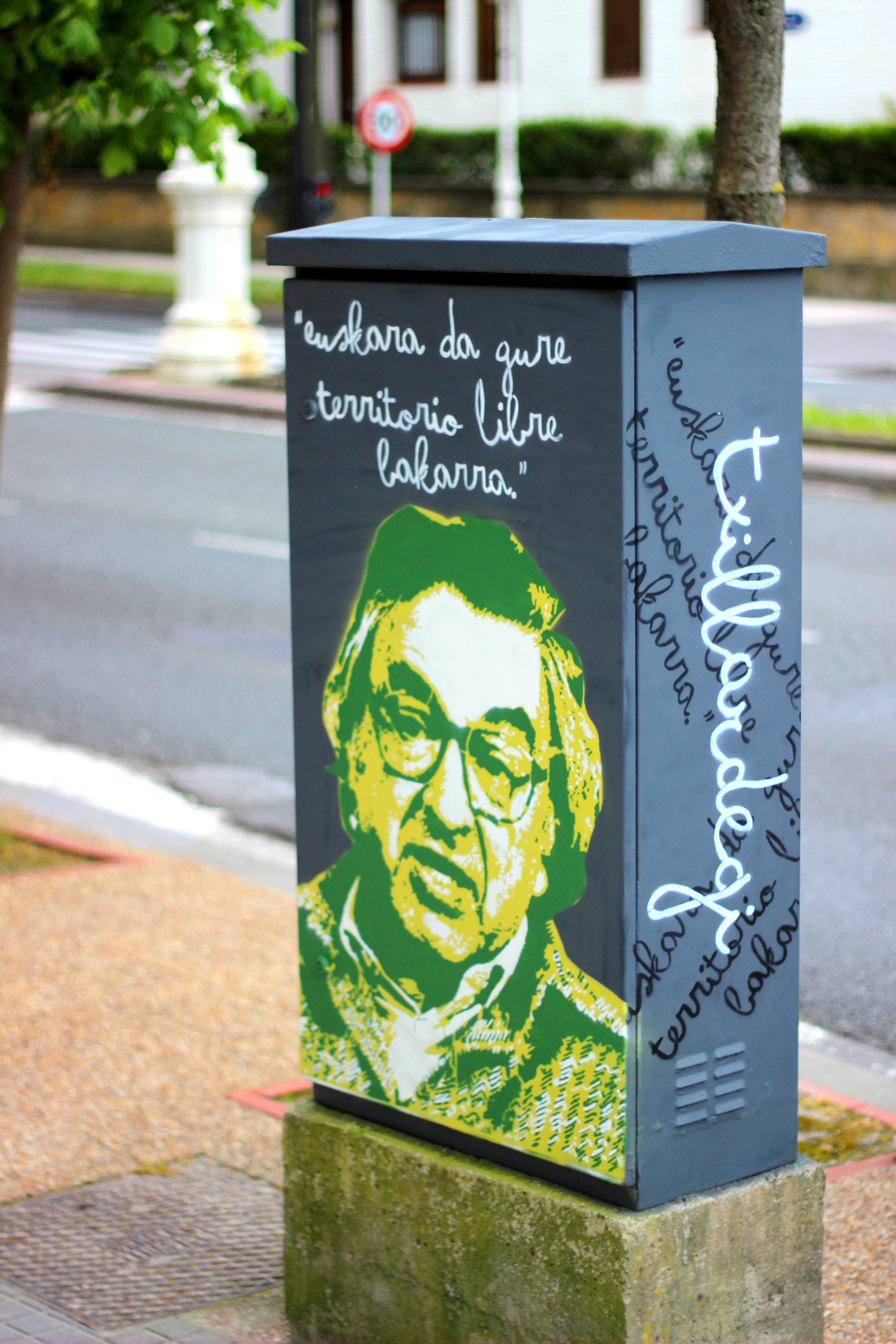 Txillardegiren omenez egindako kale sorkuntza Donostiako Antiguo auzoan.